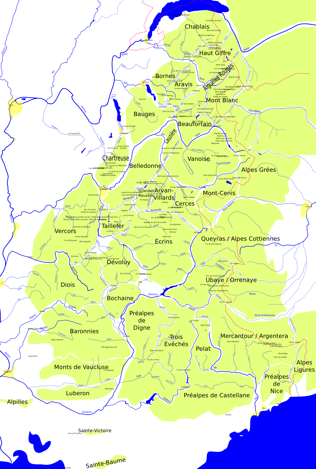 Carte représentant les massifs des Alpes françaises. Elle a été dessinée par mes soins, par dessus les vues satellites disponibles sur fr